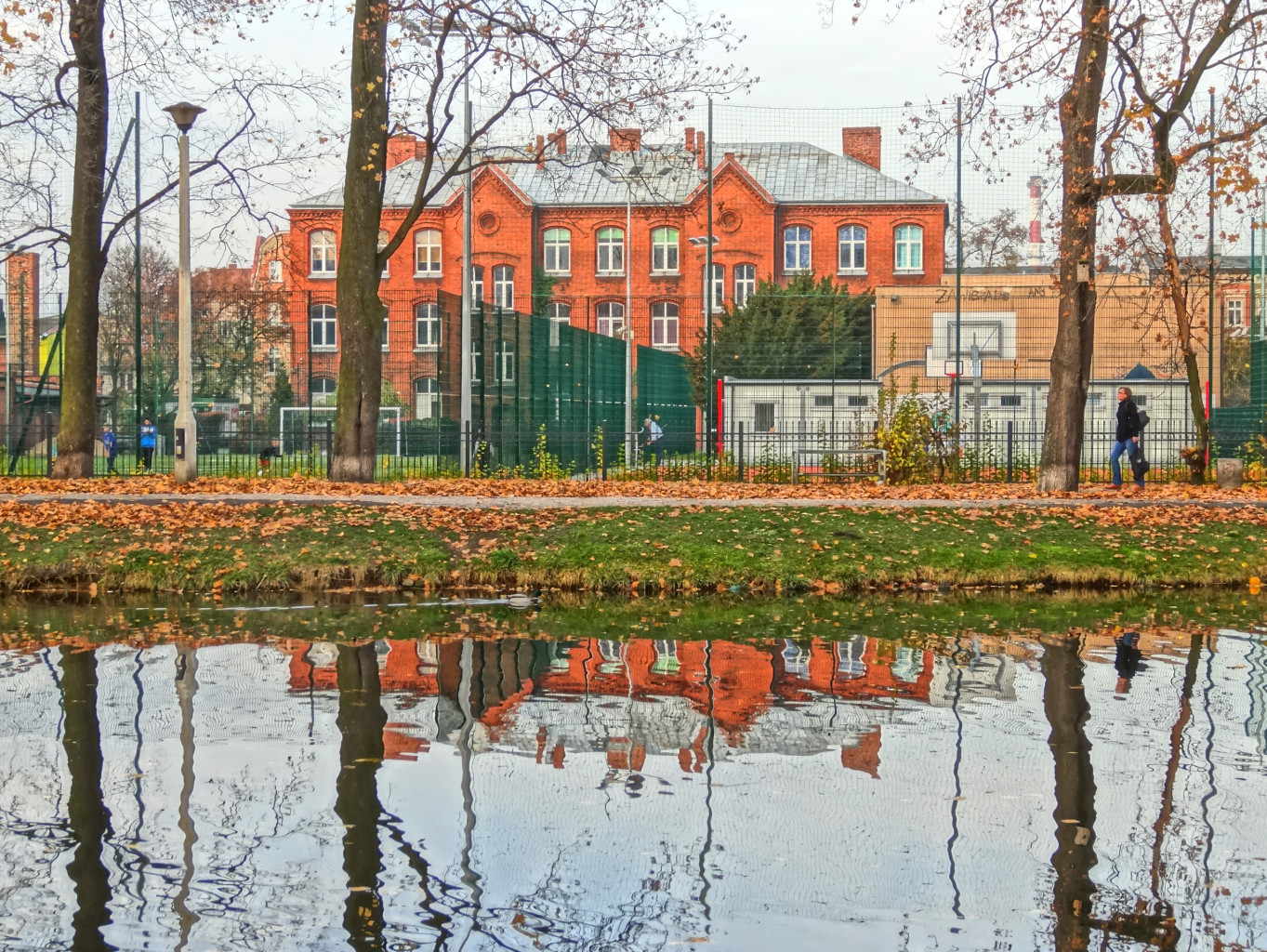 Budynek ul. Nowogrodzka 3 w Bydgoszczy (III L.0.) zbud. 1898 - widok od Kanału Bydgoskiego